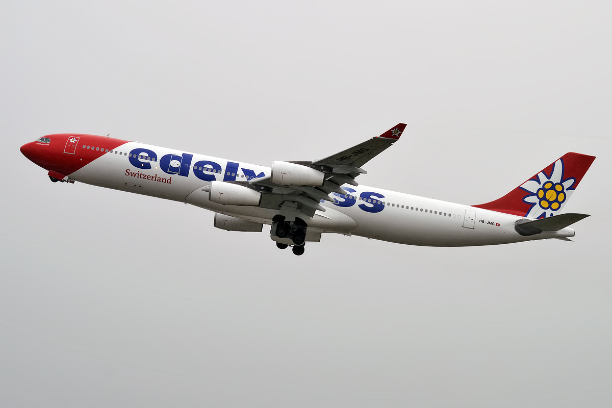 Edelweiss Air, HB-JMG, Airbus A340-313